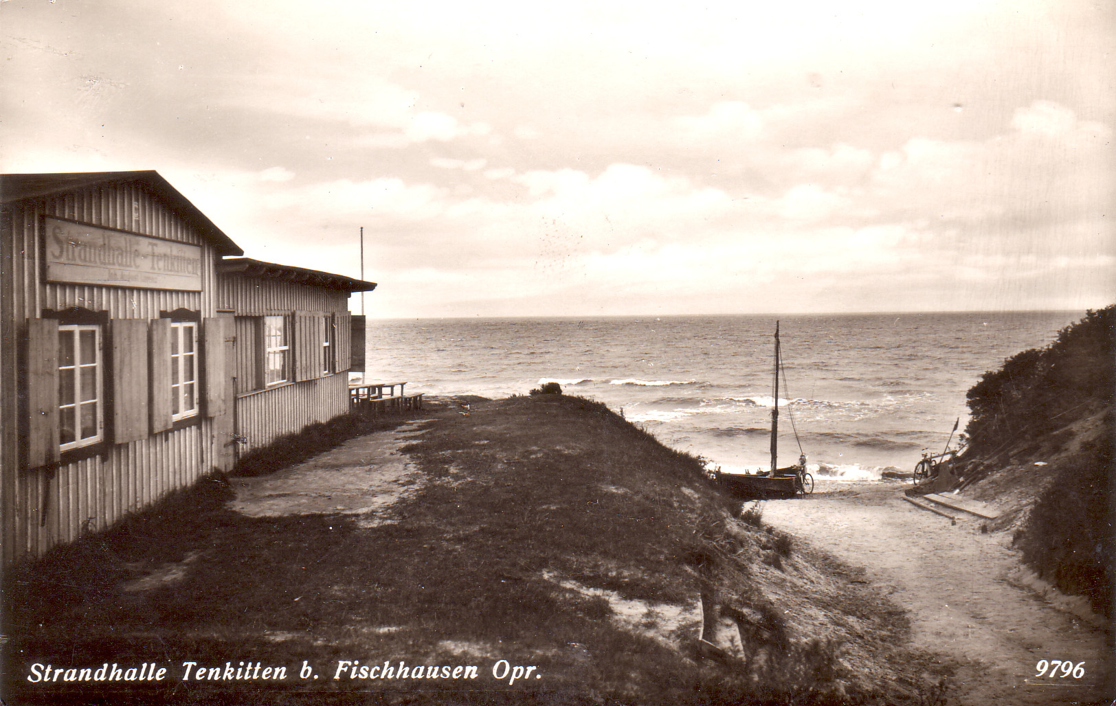 alte Postkarte aus Tenkitten mit der Strandhalle und einem Fischerboot